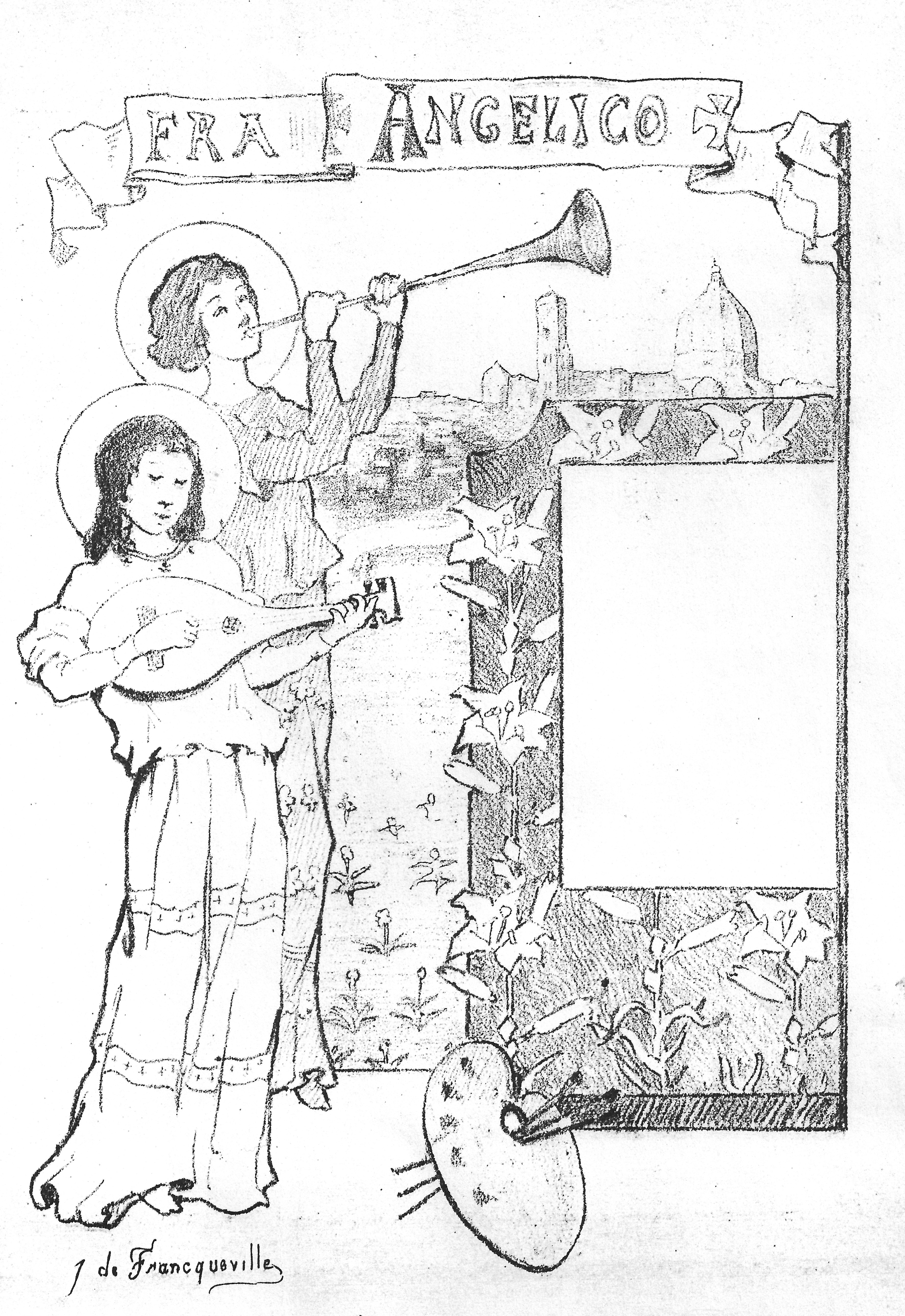 Affiche 6 Jean de Francqueville